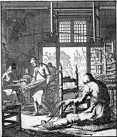 Die Stuhlmacher in ihrer Werkstatt um 1720. Flecht- und Drechselarbeiten sind dargestellt.